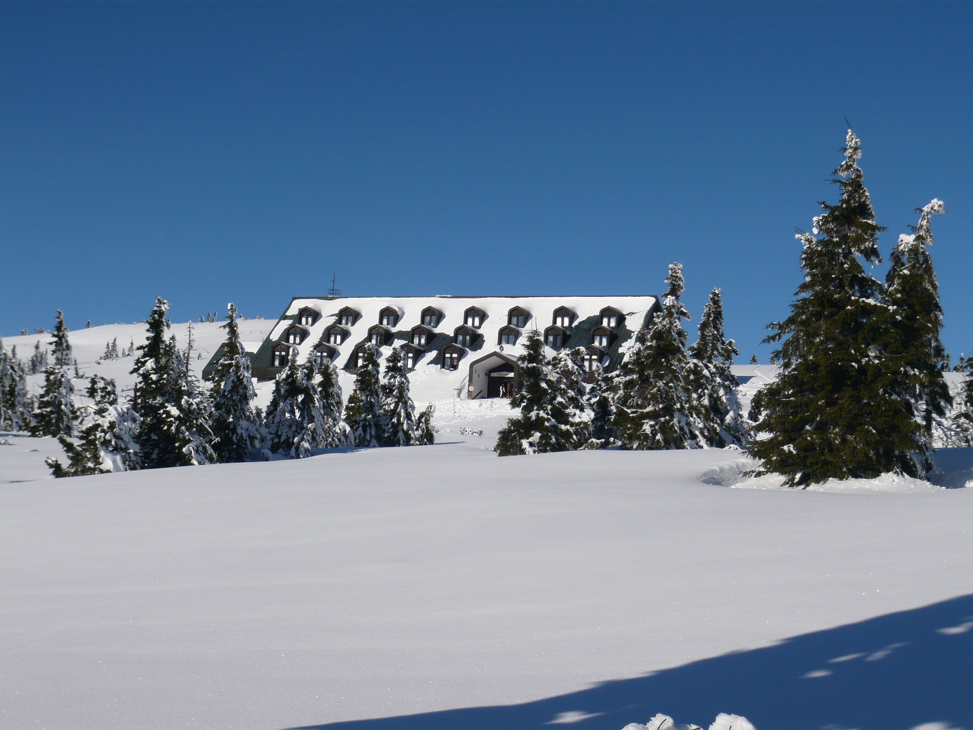 Chata Výrovka současnost - v zimě